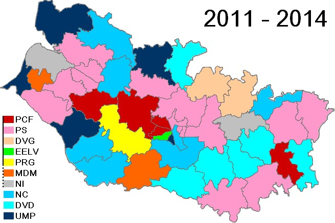 Conseil général de la Somme depuis le 27 Mars 2011.